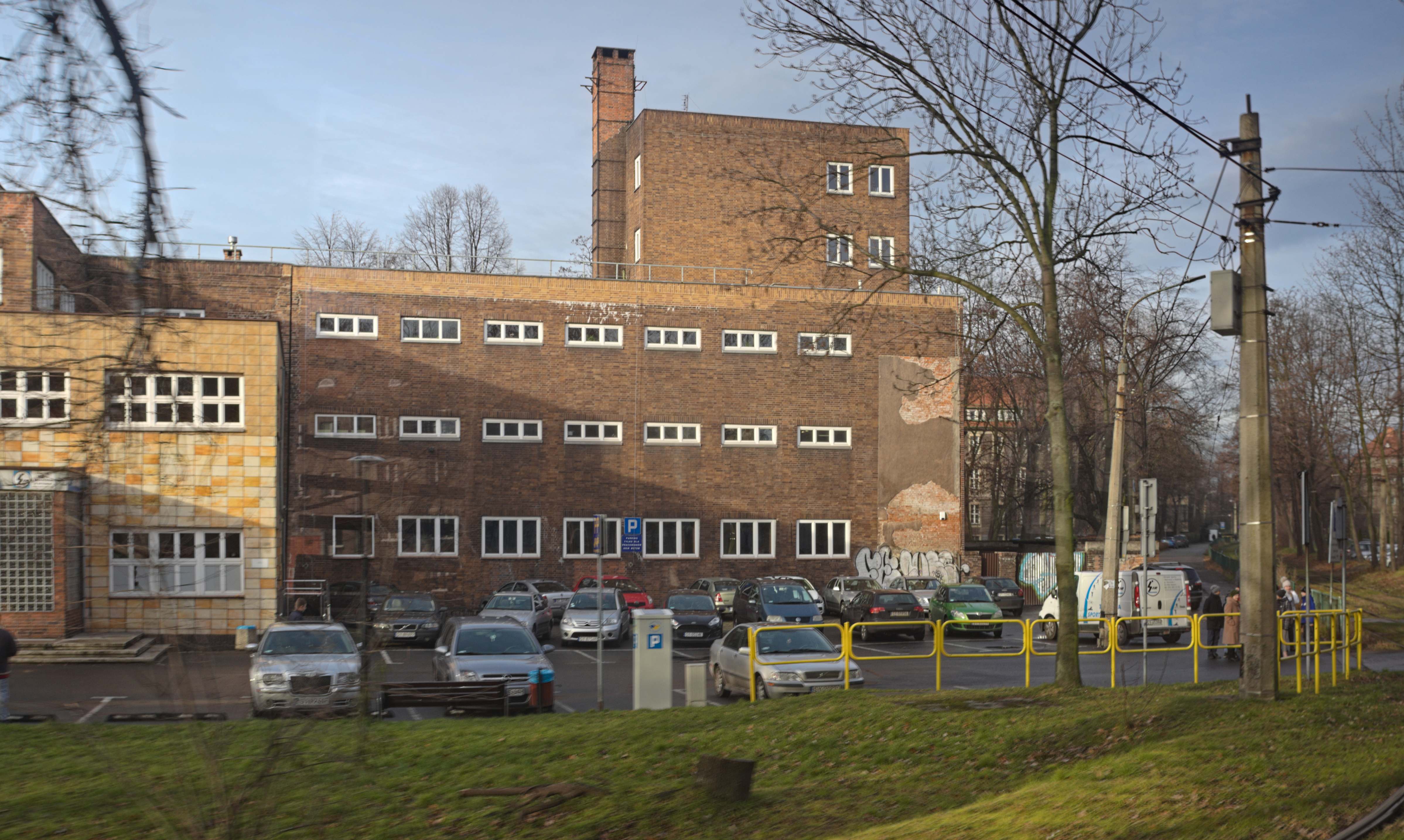 budynek zakładu kąpielowego w Bytomiu, po prawej sześciokondygnacyjna wieża o wysokości 22,6 metra, w której ulokowano kotłownię i zbiorniki na ciepłą i zimną wodę oraz solankę; widok z okna tramwaju